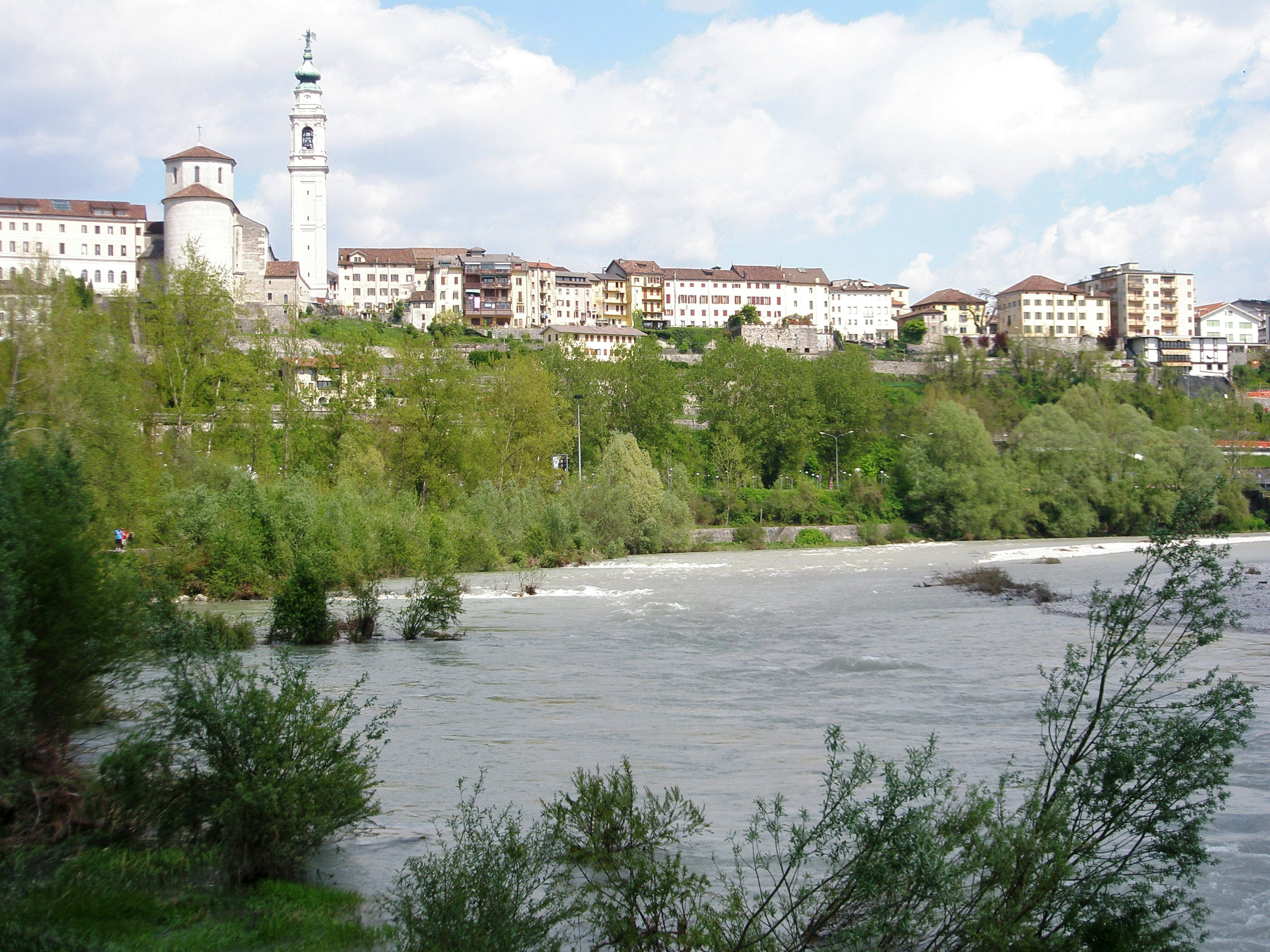 Veduta di Belluno e del Piave da Lambioi